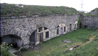 Casernes de Toulbroc'h (Plouzané)